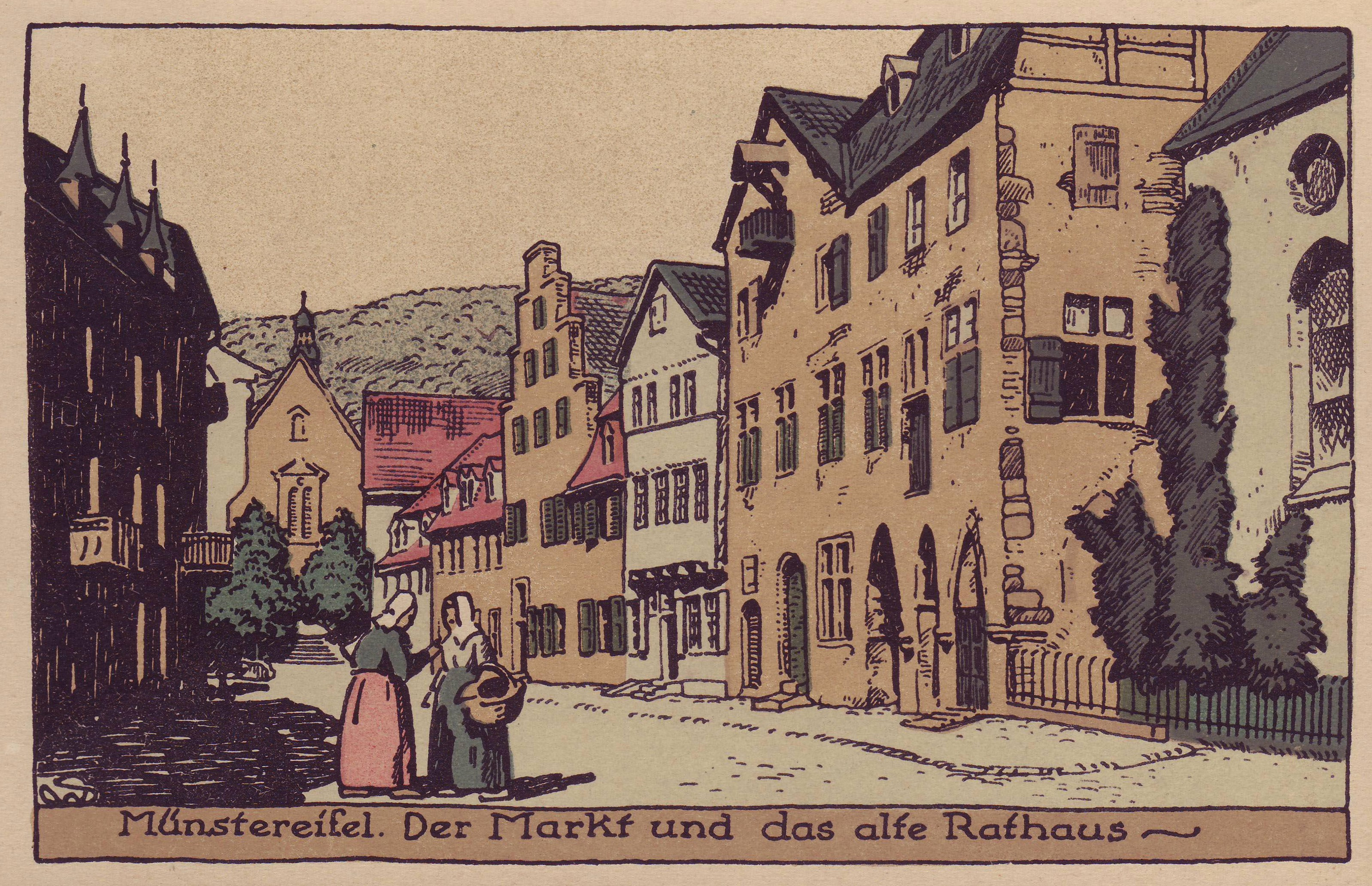 Postkartenverlag Friedrich Schulte, Postkarte Münstereifel, Marktstraße, Altes Rathaus um 1900